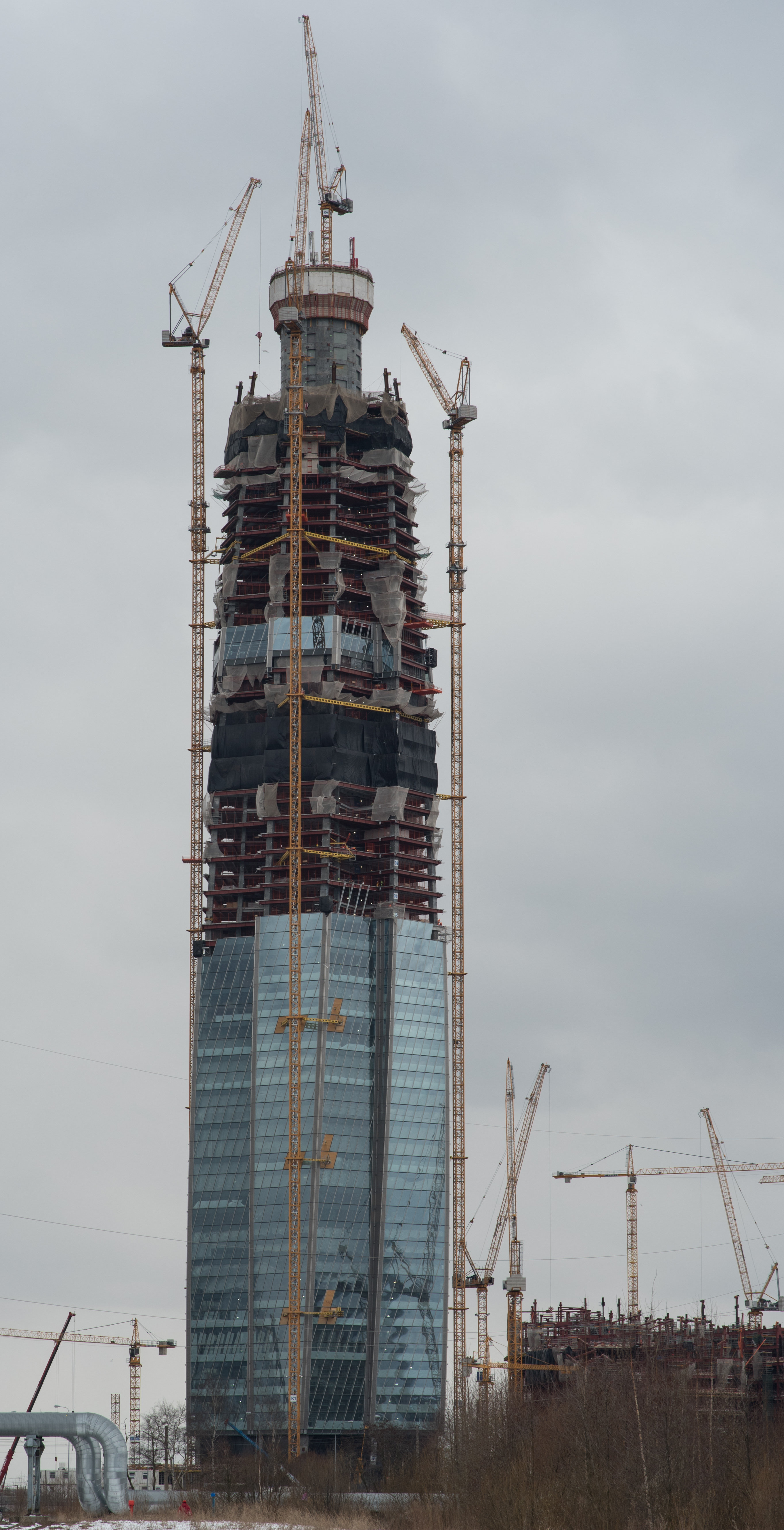 Лахта-центр (апрель 2017) 310 метров